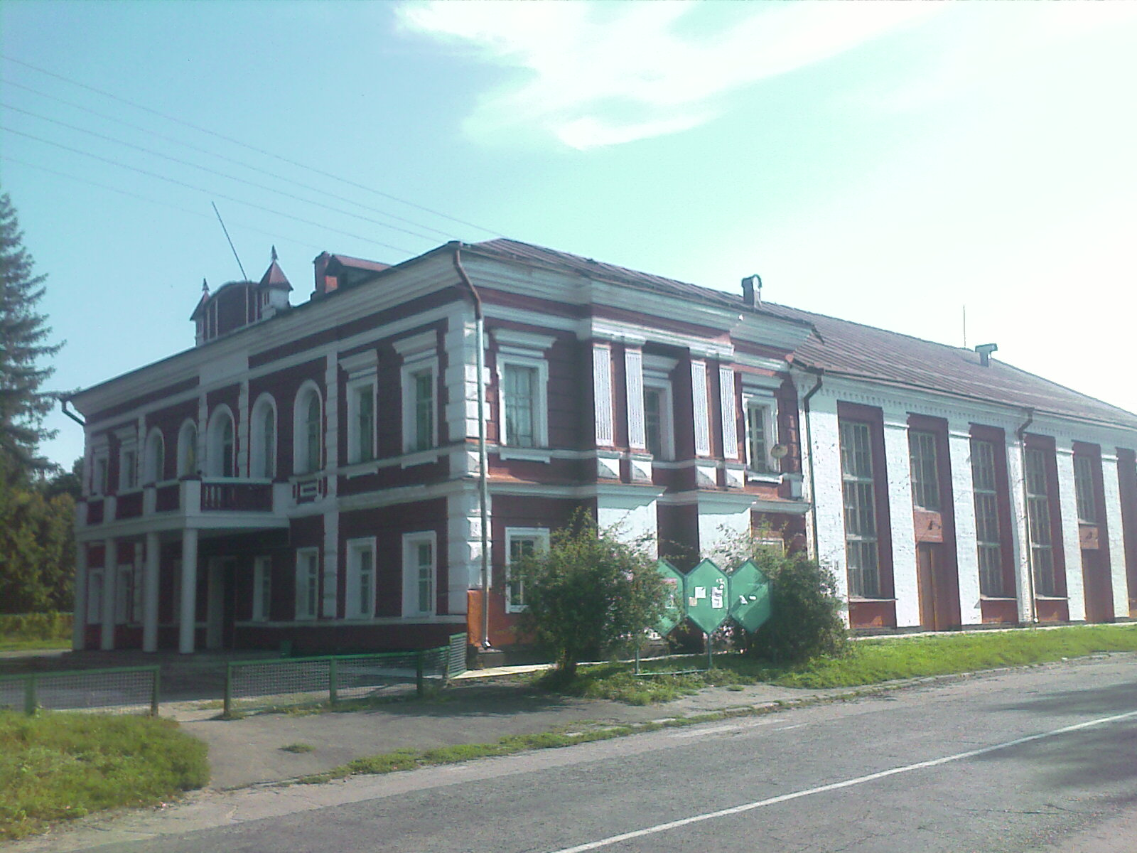 Одне з приміщень із садиби князів Щербатових. Нині - селищний будинок культури.